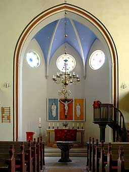 Altar der Zingster Kirche.jpg